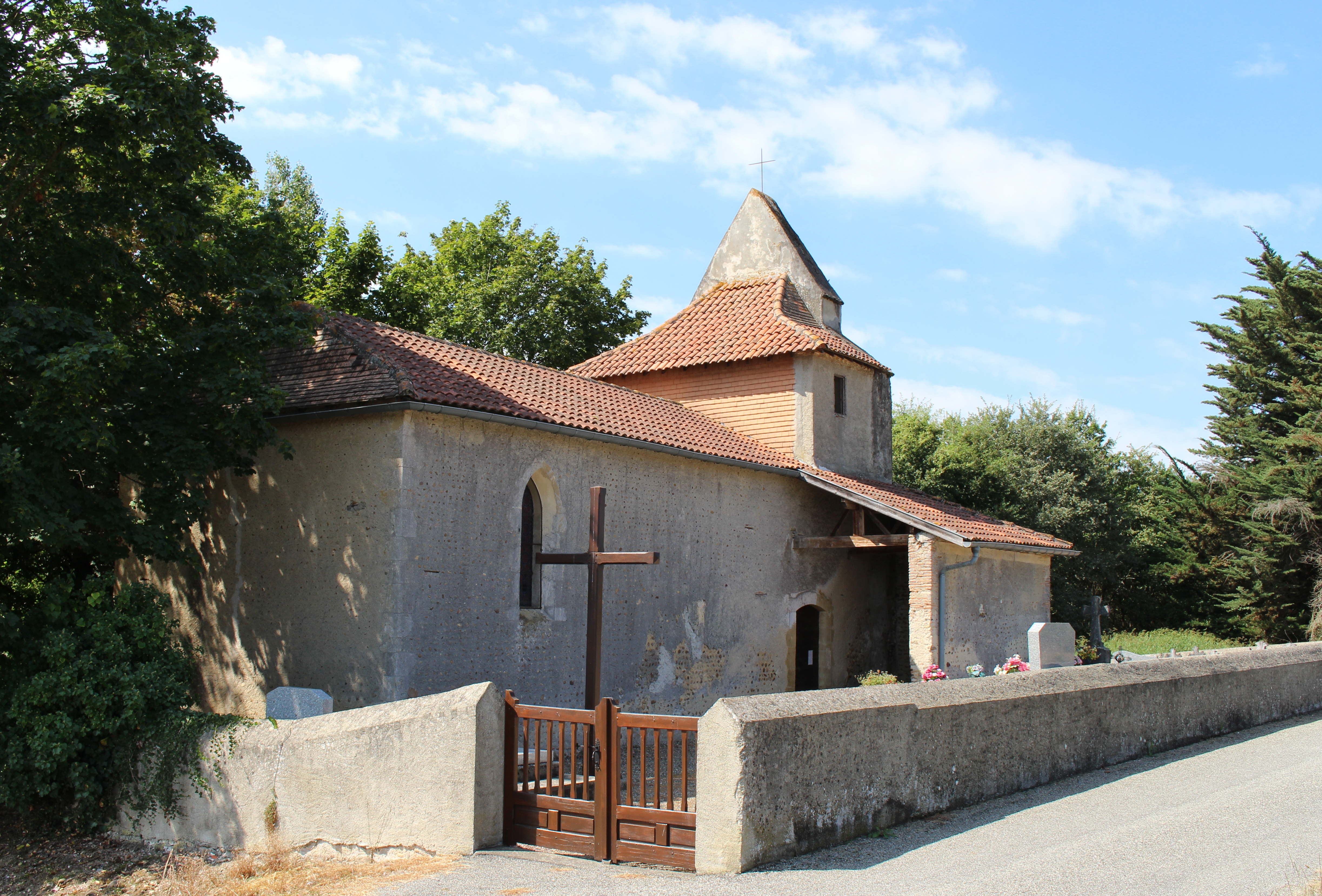 Église Saint-Martin de Héchac (Hautes-Pyrénées)